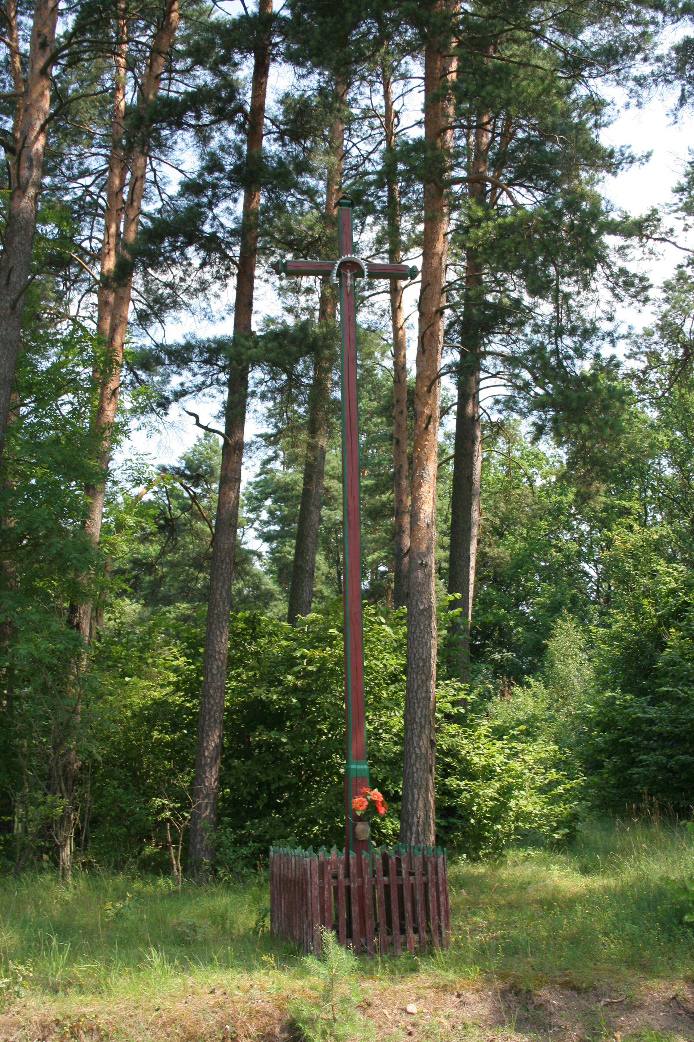 Krzyż przydrożny we wsi Gulbin.